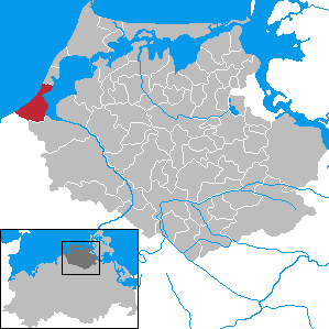 Dierhagen in Mecklenburg-Vorpommern - District Nordvorpommern